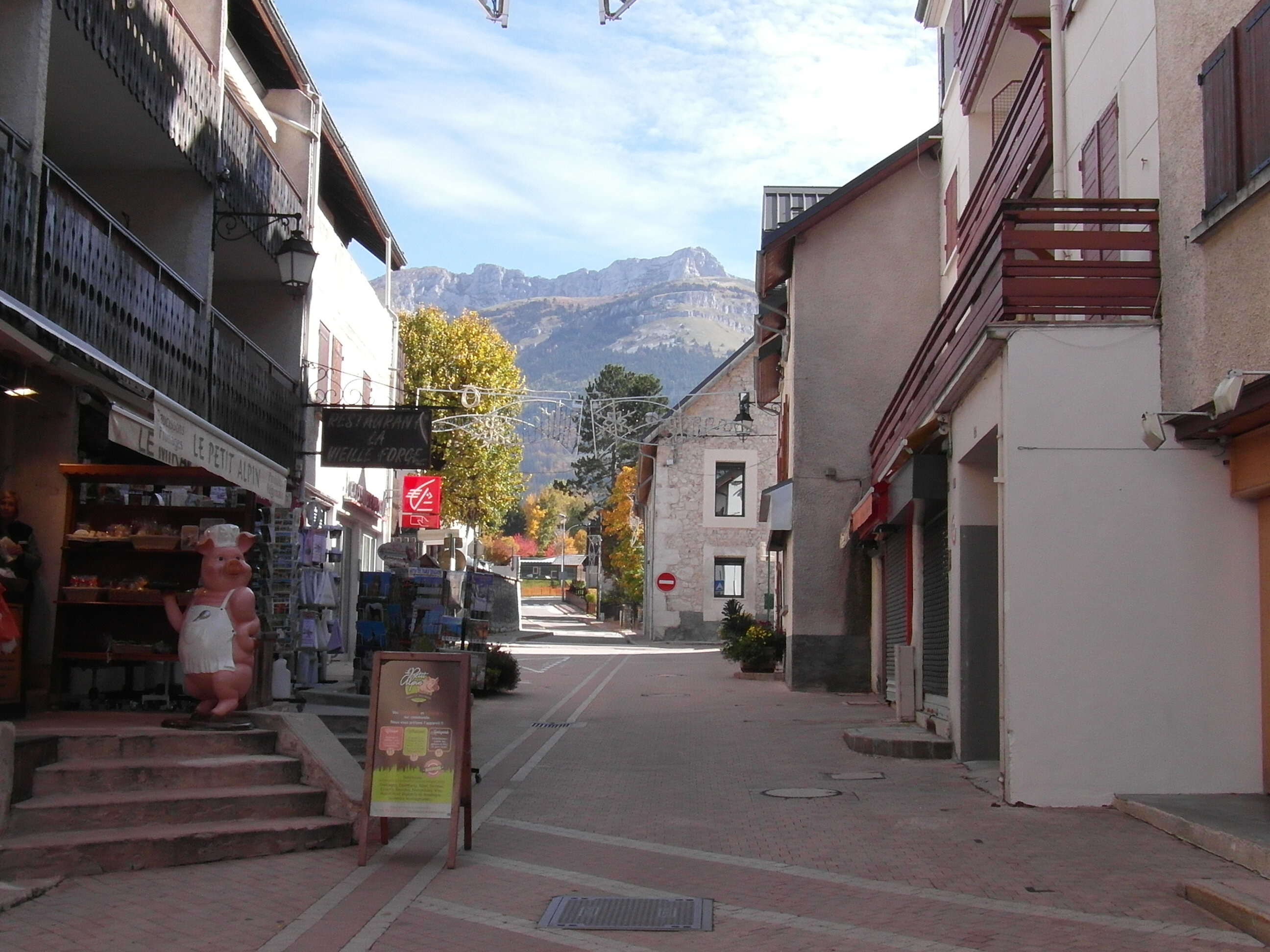 rue piétonne de Villard-de-Lans